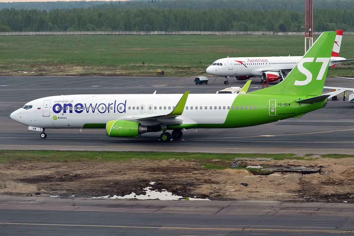 S7 Airlines, VQ-BKW, Boeing 737-8ZS